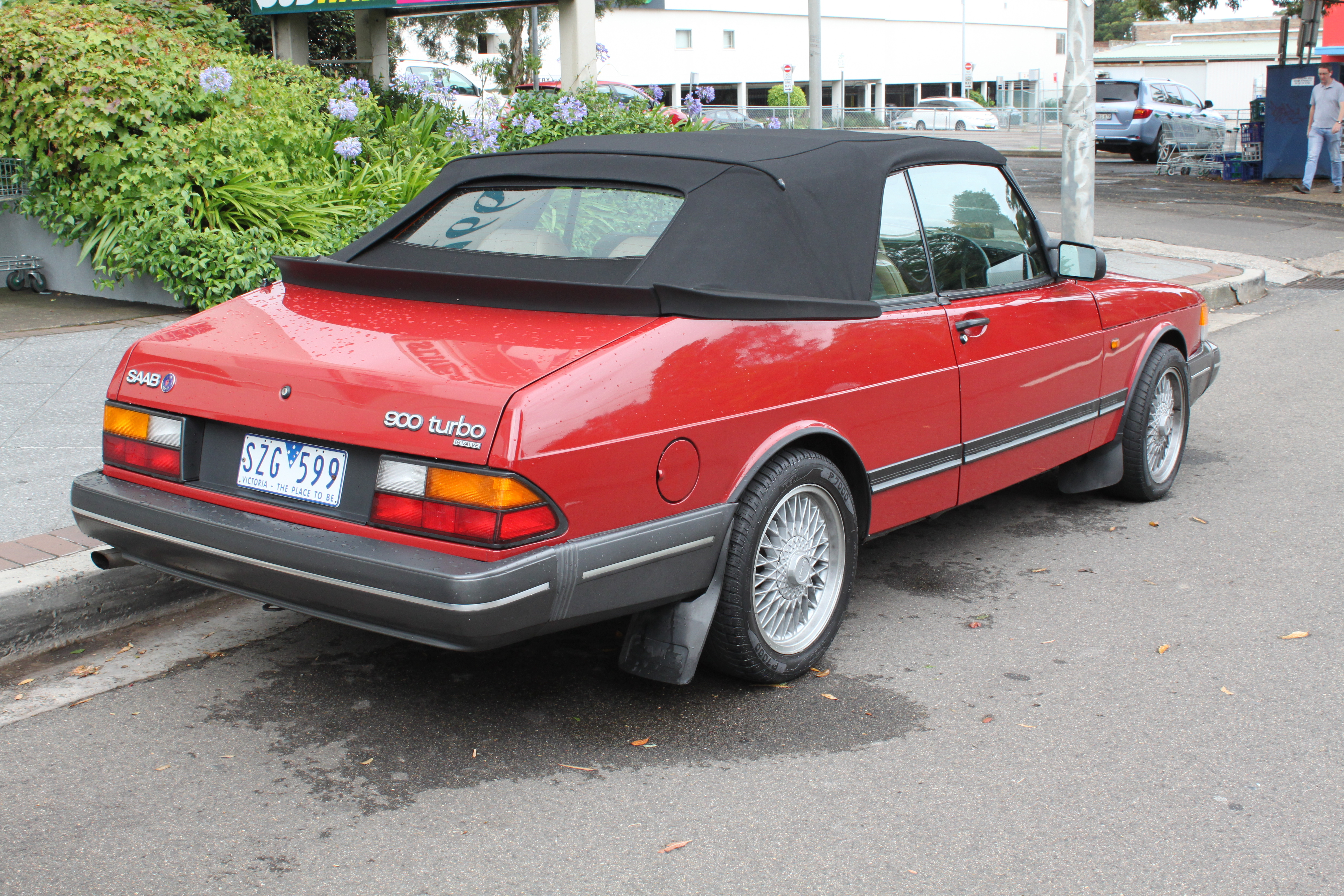 Saab 900 Turbo Convertible